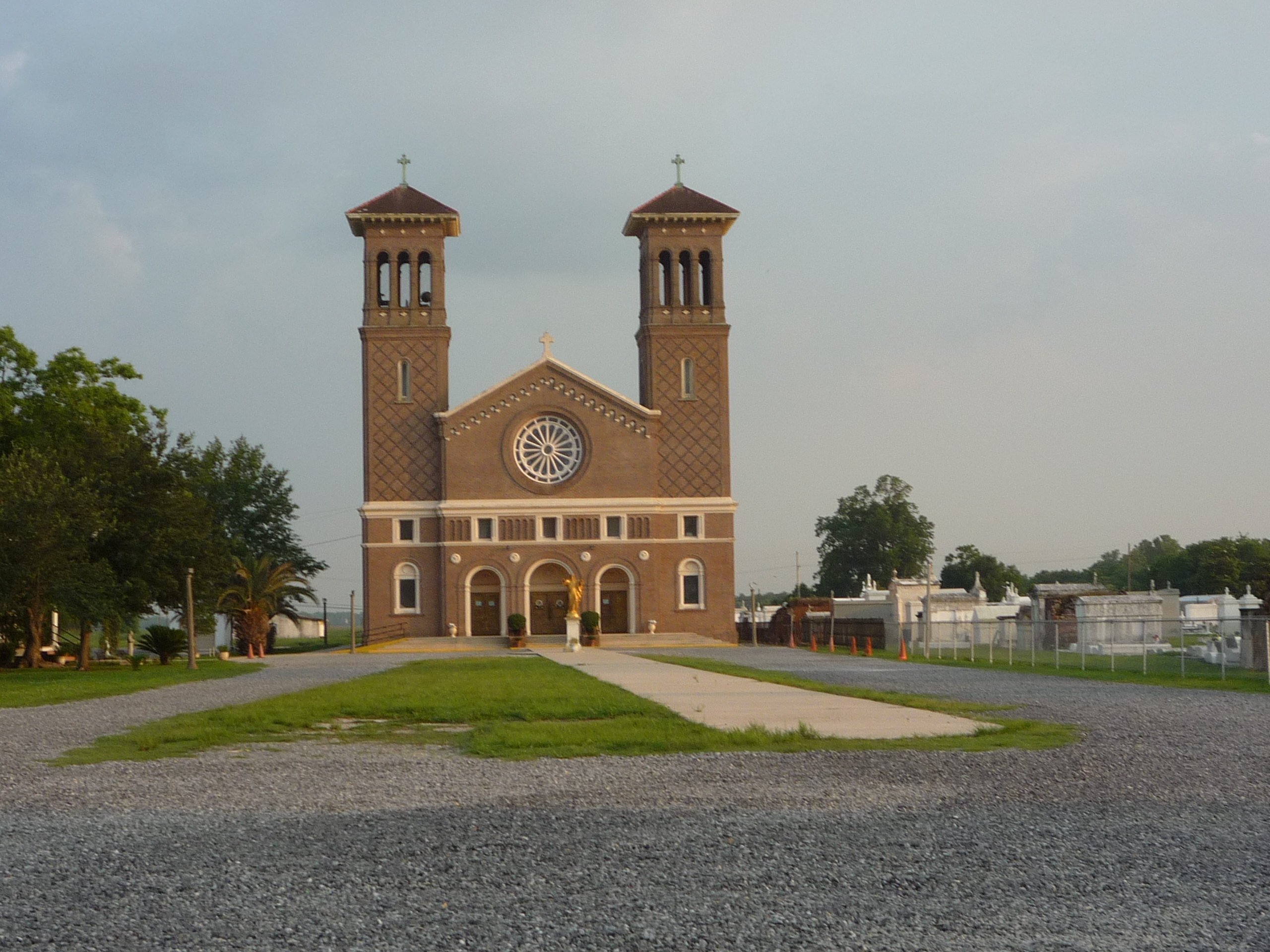 Edgard, LA L'église catholique Saint-Jean-Baptiste.